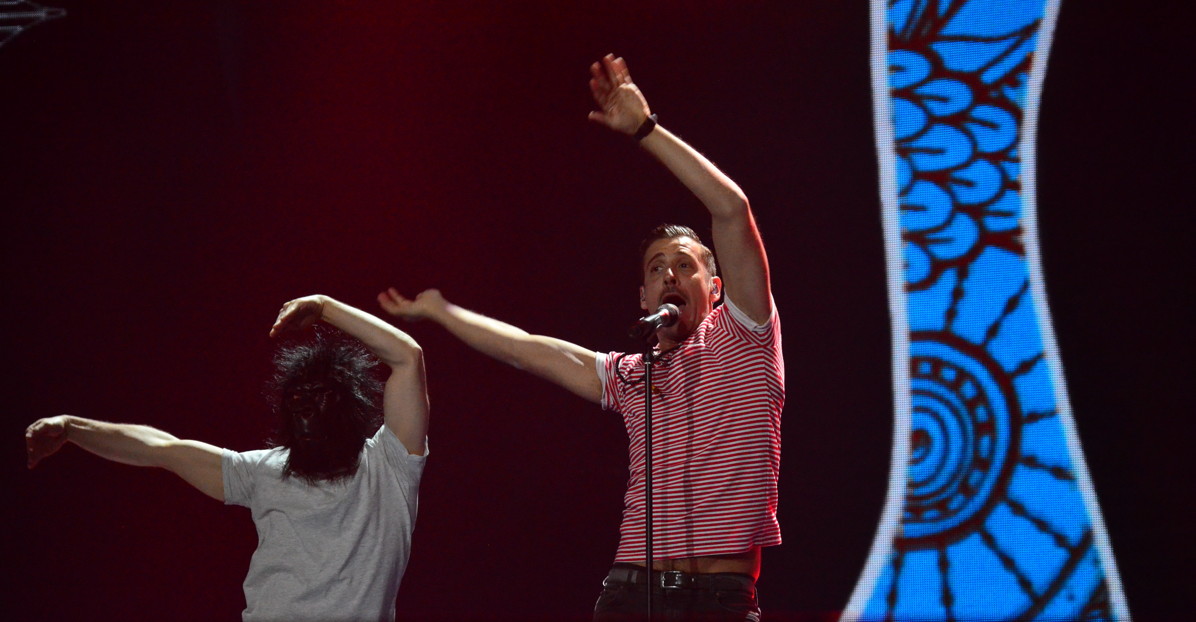 12 травня. Генеральна репетиція фіналу Євробачення 2017. Francesco Gabbani (Italy).